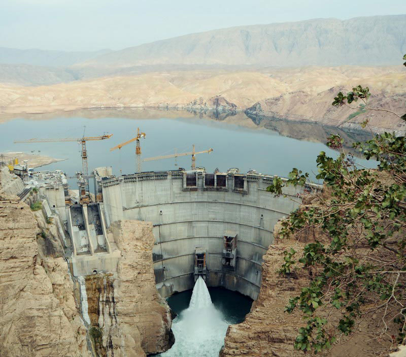 سد سيمره